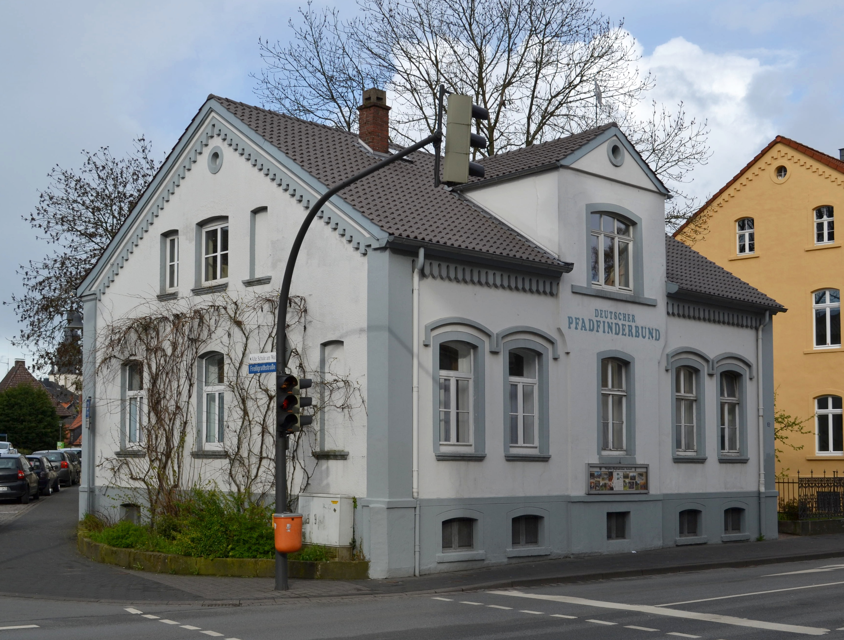 Baudenkmal Detmold Nr. 403 - Wohnhaus Paulinenstraße 13 Deutscher Pfadfinderbund, Jungenschaft Theotmalli